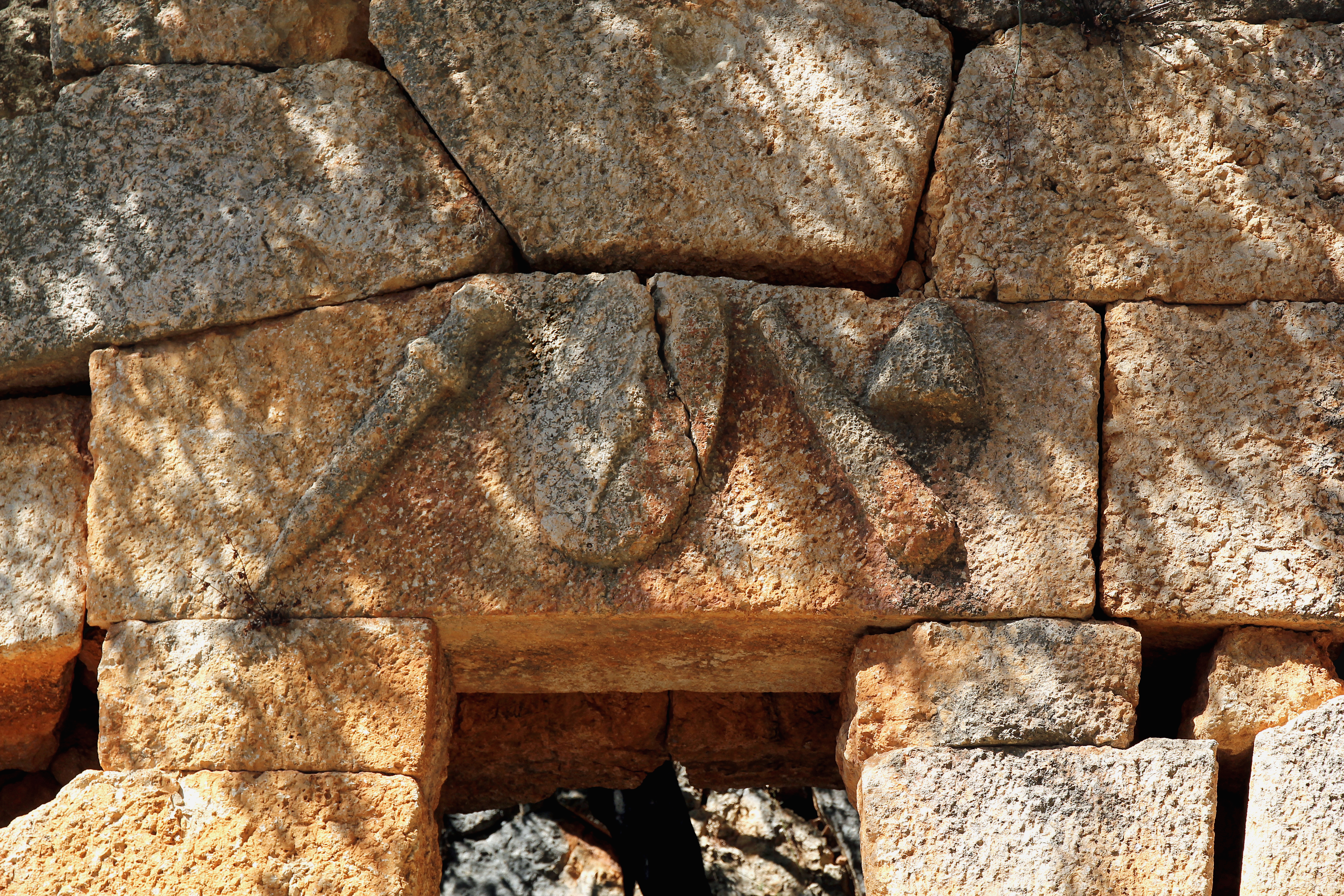 Kilikischer Turm von Hançerli bei Kızkalesi in der Südtürkei, auf dem Tüsturz Olbische Zeichen: Schwert, Schild, Keule und Dioskurenkappe